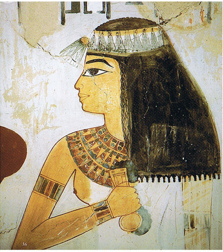 Taui als Beobachterin des Opfers